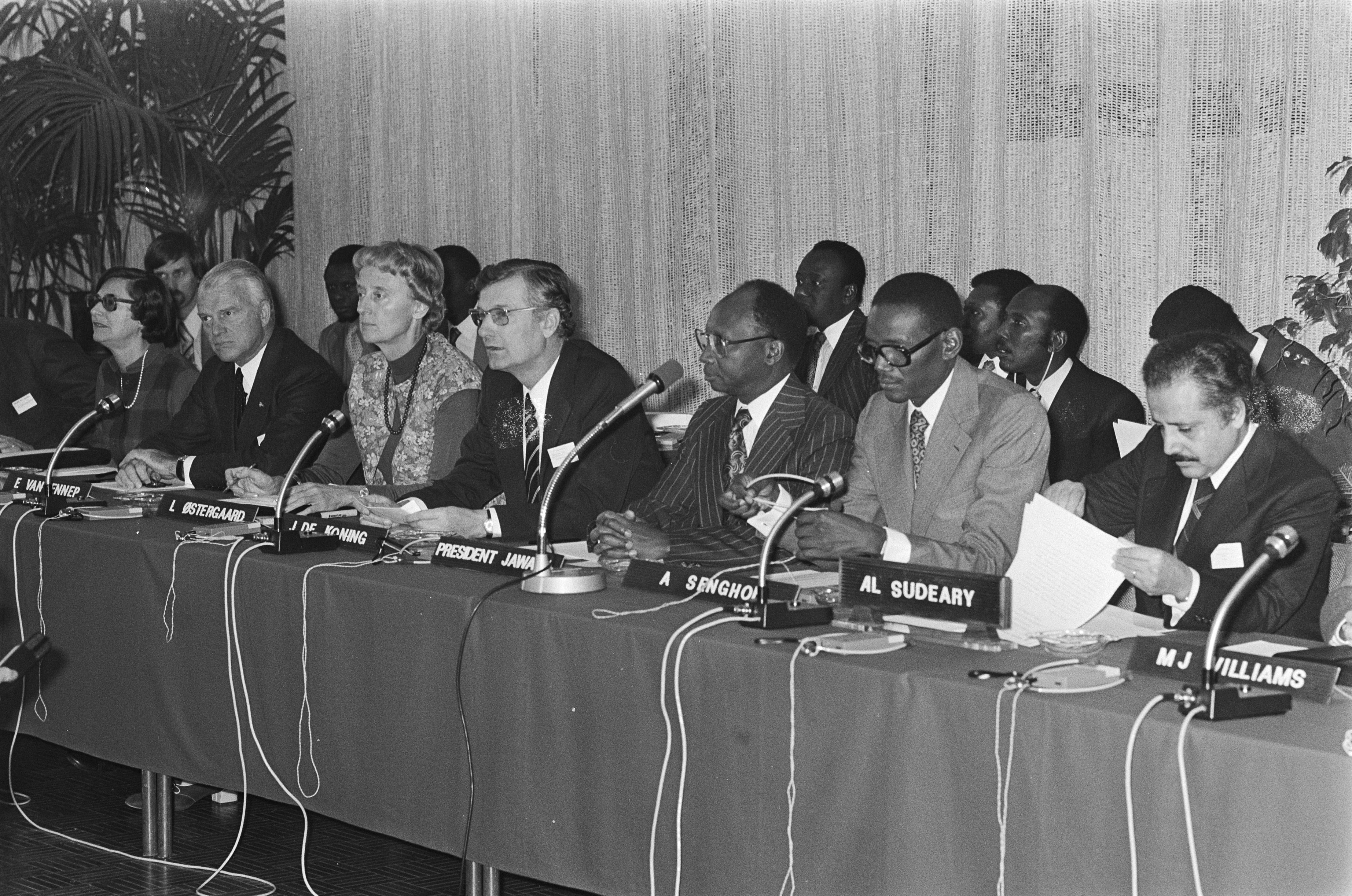 Collectie / Archief : Fotocollectie Anefo Reportage / Serie : [ onbekend ] Beschrijving : Congres club de Sahel in Amsterdam; tijdens congres 3e van links minister De Koning, rechts naast hem president Jawara van Gambia Datum : 21 november 1978 Locatie : Amsterdam, Gambia Trefwoorden : congressen, ministers, presidenten Persoonsnaam : Gambia, Jawara President, Koning, Jan de Fotograaf : Suyk, Koen / Anefo Auteursrechthebbende : Nationaal Archief Materiaalsoort : Negatief (zwart/wit) Nummer archiefinventaris : bekijk toegang 2.24.01.05 Bestanddeelnummer : 930-0077